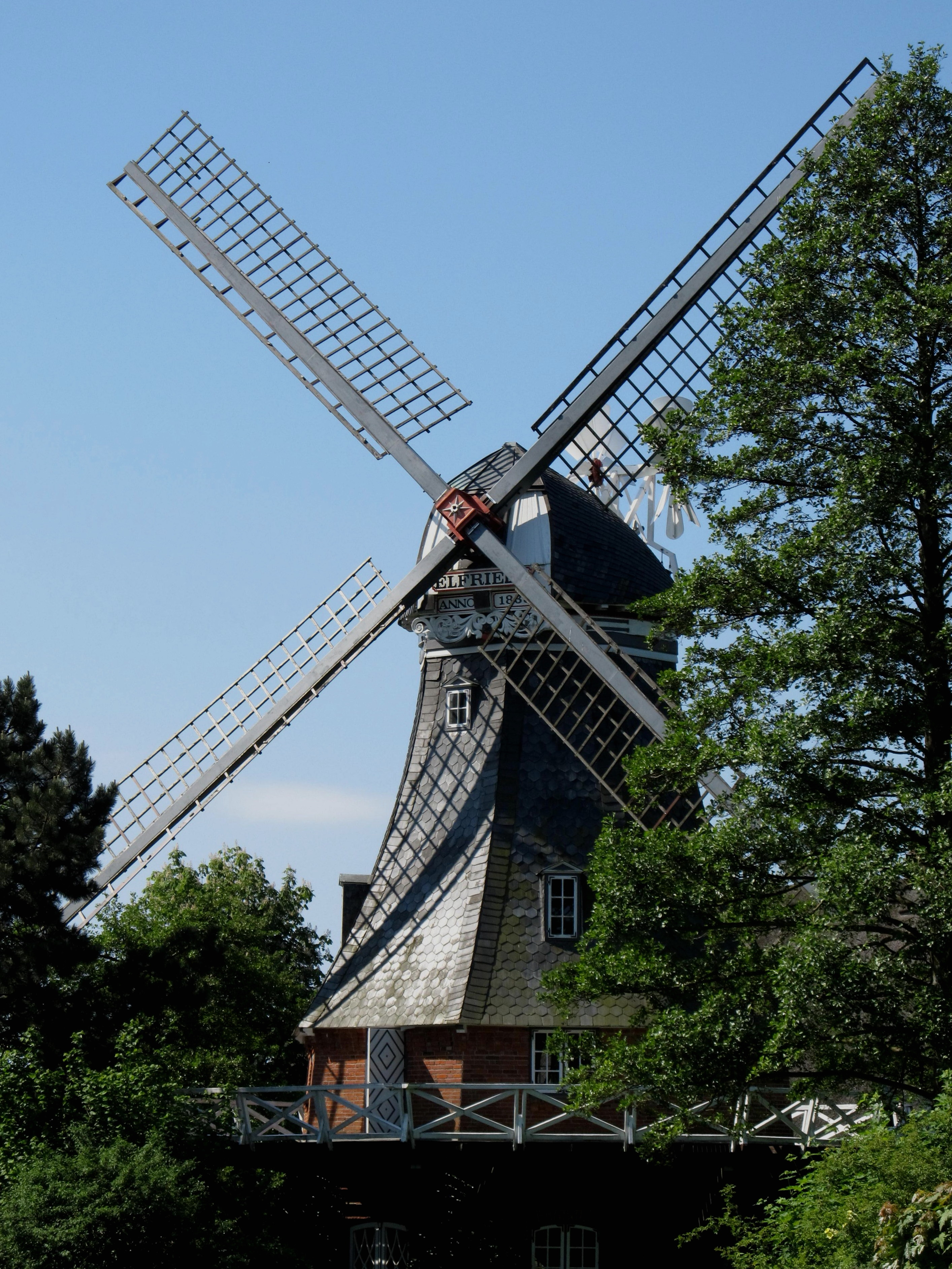 Windmühle Elfriede in Husberg, Dorfstraße 18, Bönebüttel (Kreis Plön), Der Galerieholländer wurde erst 1980 am jetzigen Standort errichtet, der Rumpf stammt von einer Mühle aus Jevenstedt (1838)